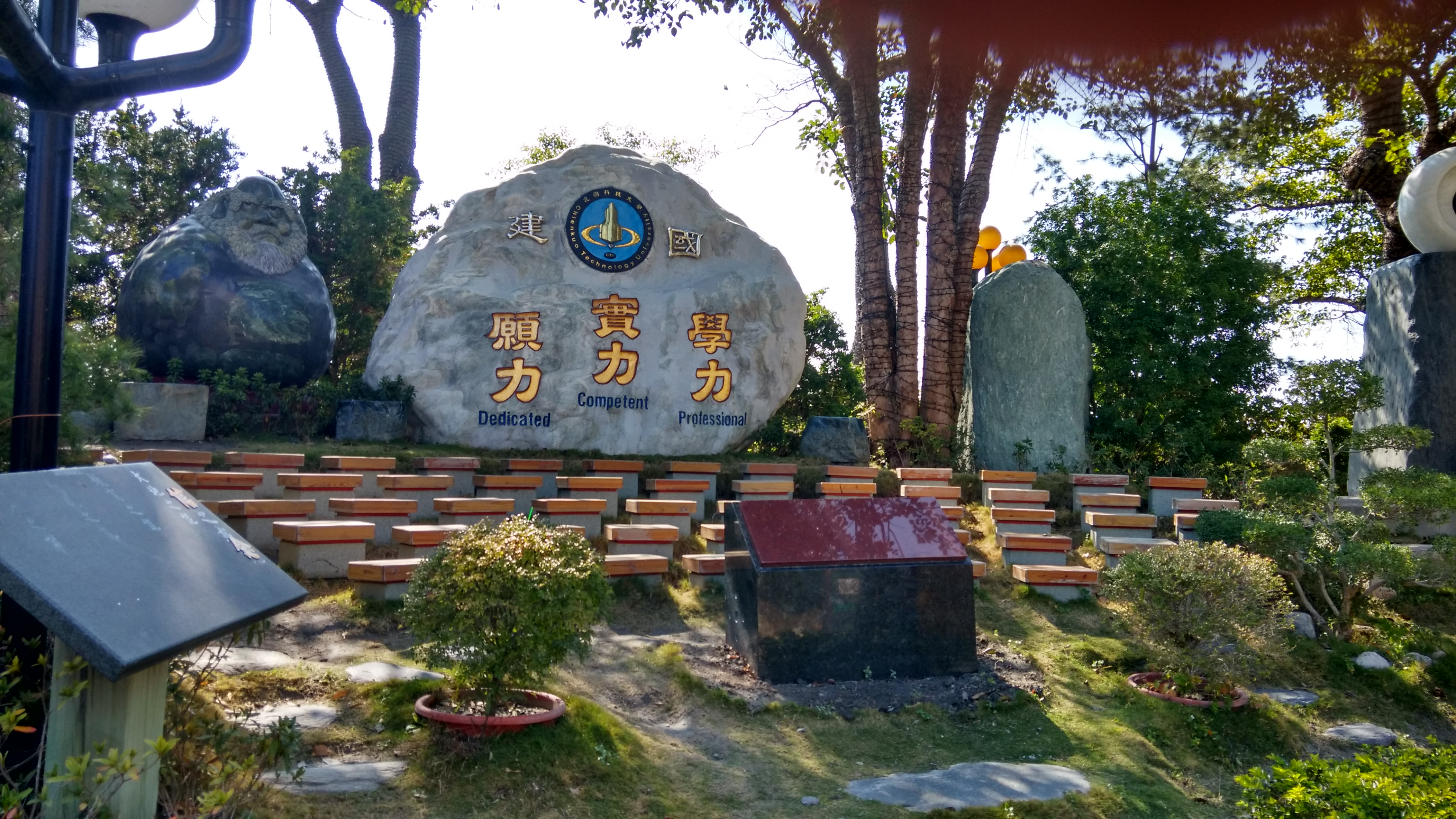 中文（台灣）: 建國科技大學校訓石。